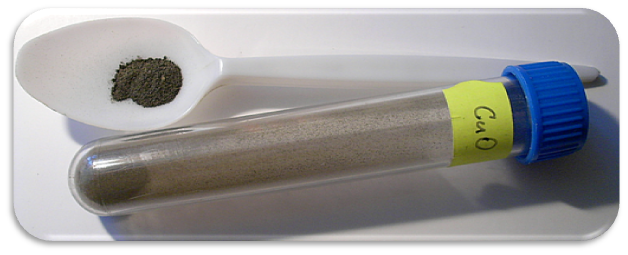 Oxid měďnatý - CuO